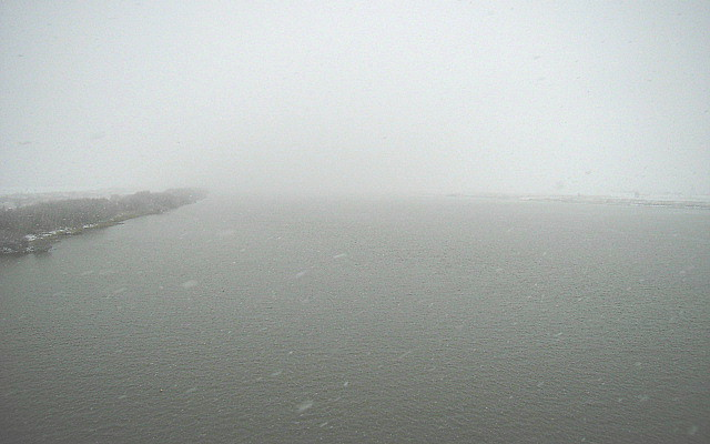 Ishikari River, Hokkaido, Japan